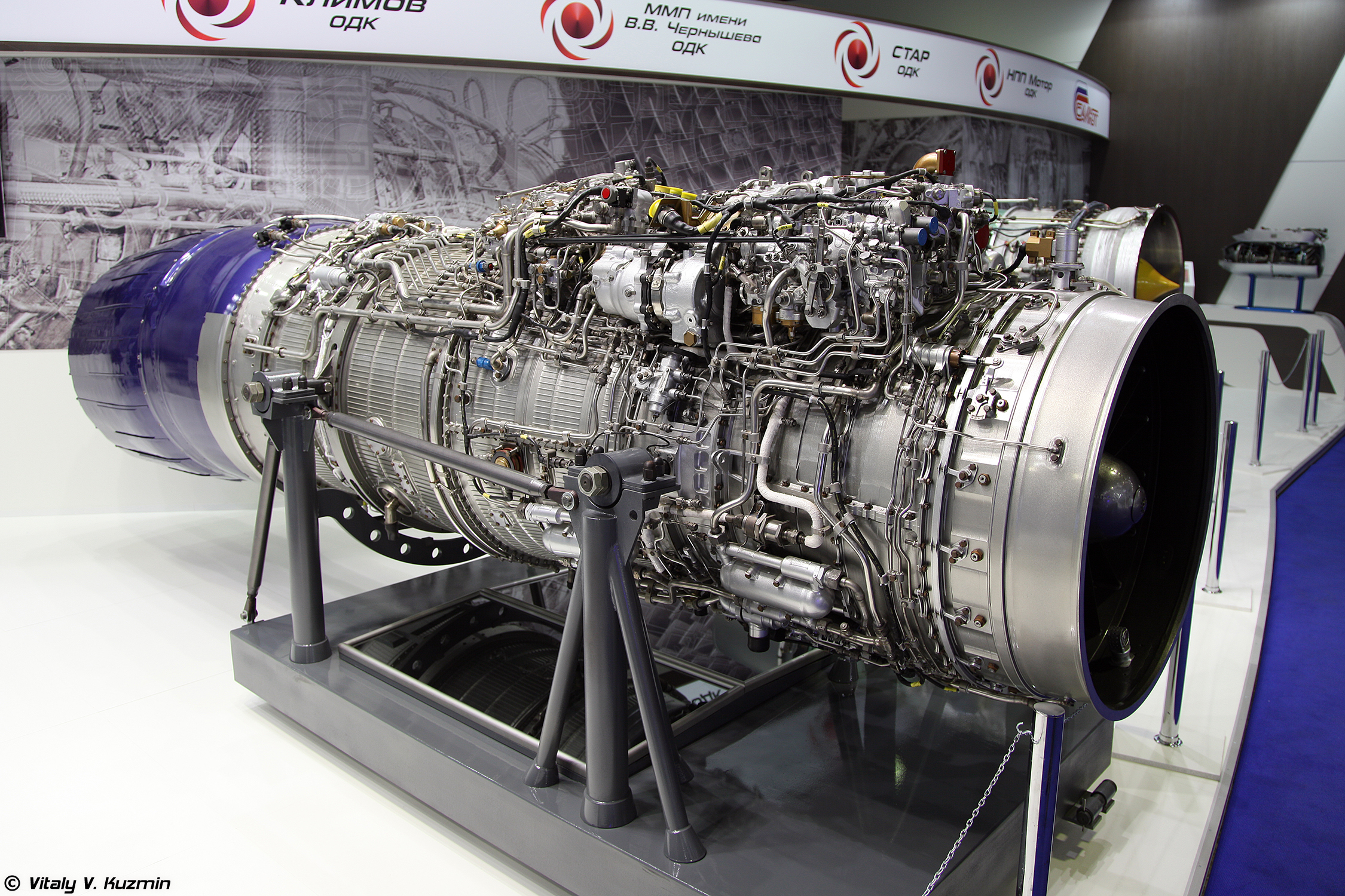 Турбореактивный двигатель РД-33МК (RD-33MK engine)